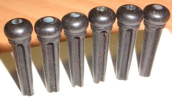 木吉他弦栓